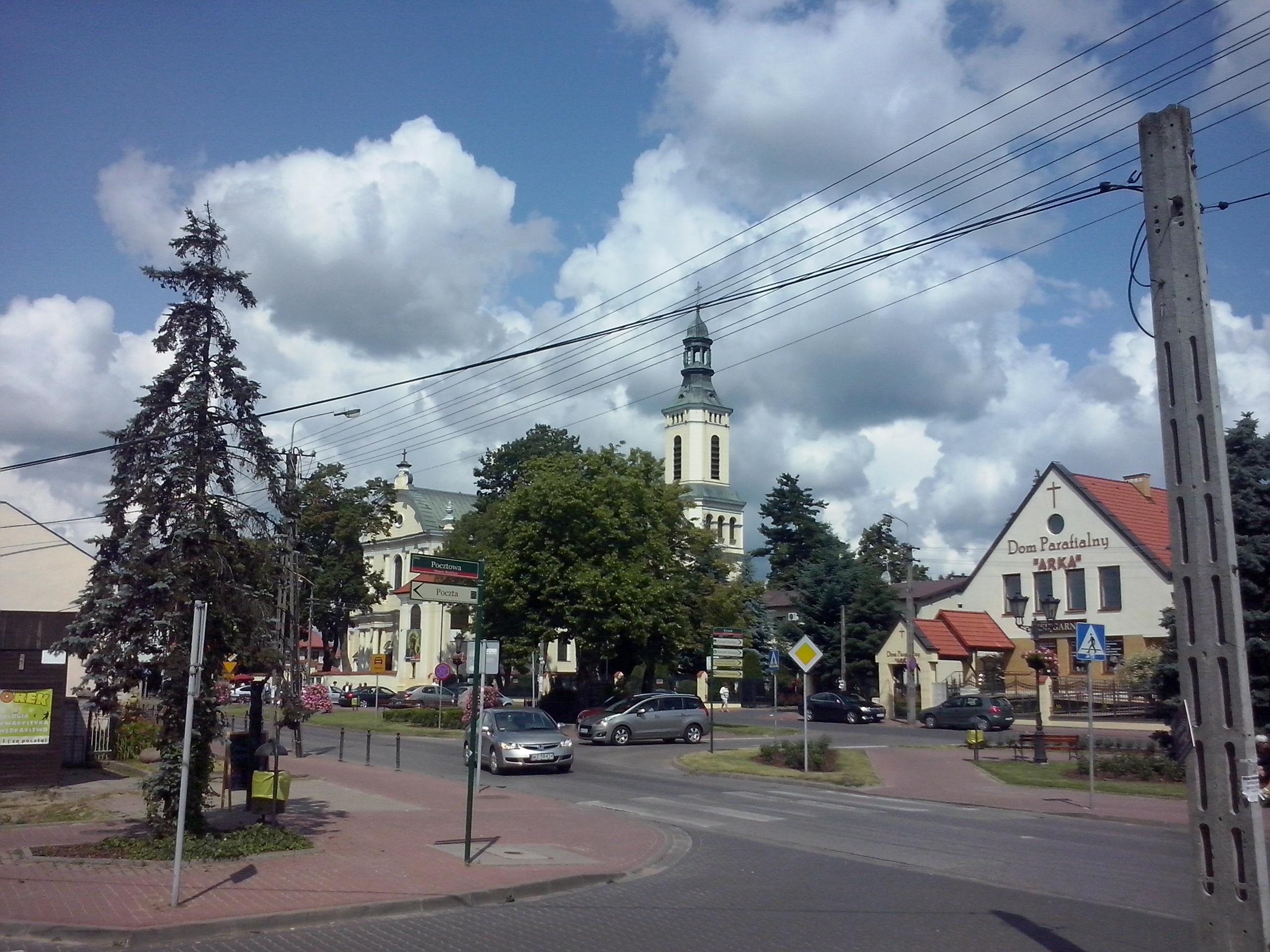 Stare Babice (gm. Stare Babice, pow. warszawski zachodni) - Rynek